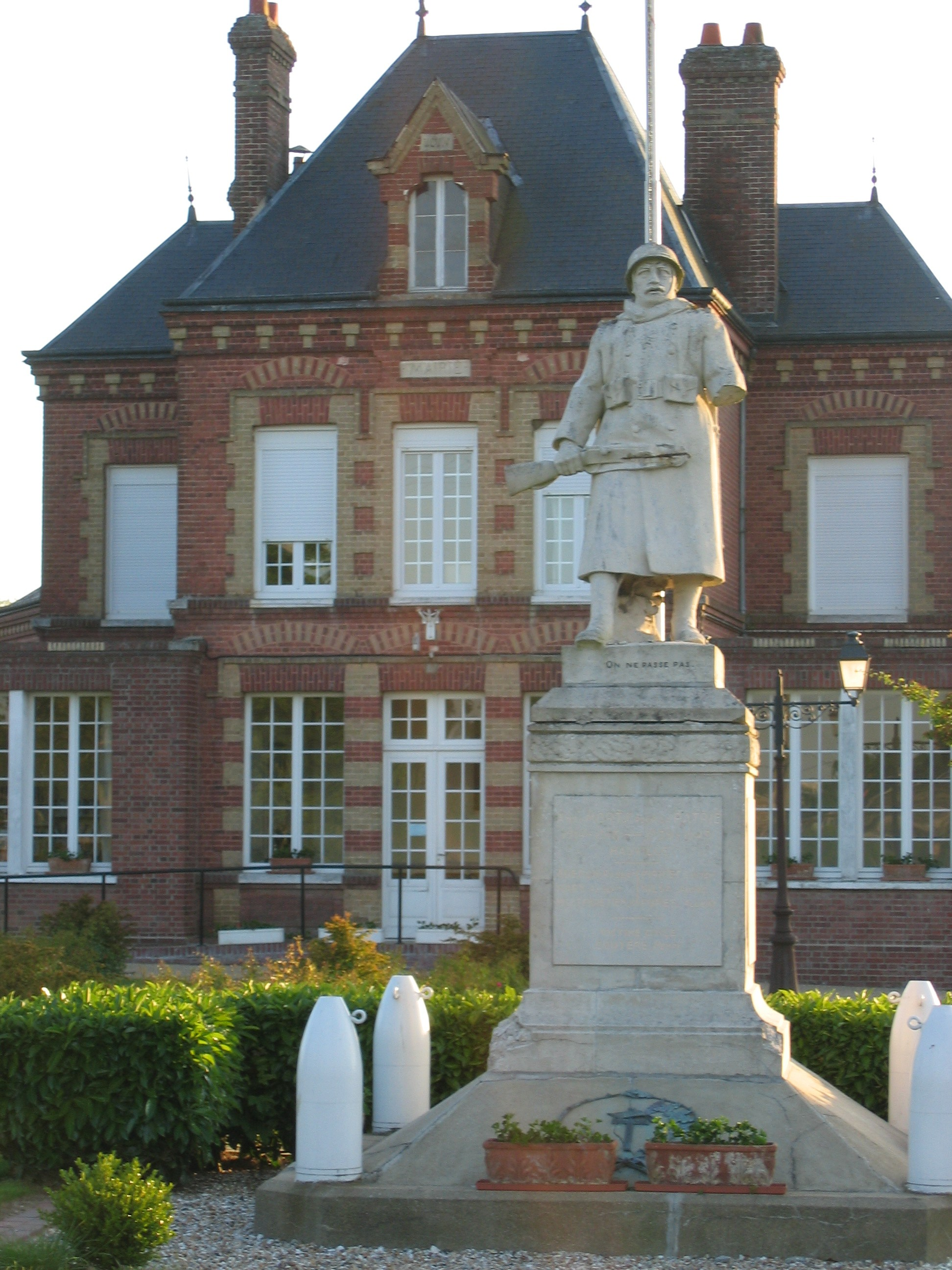 Photo de la mairie d'Hauville (27), prise en juin 2005. Sawyer